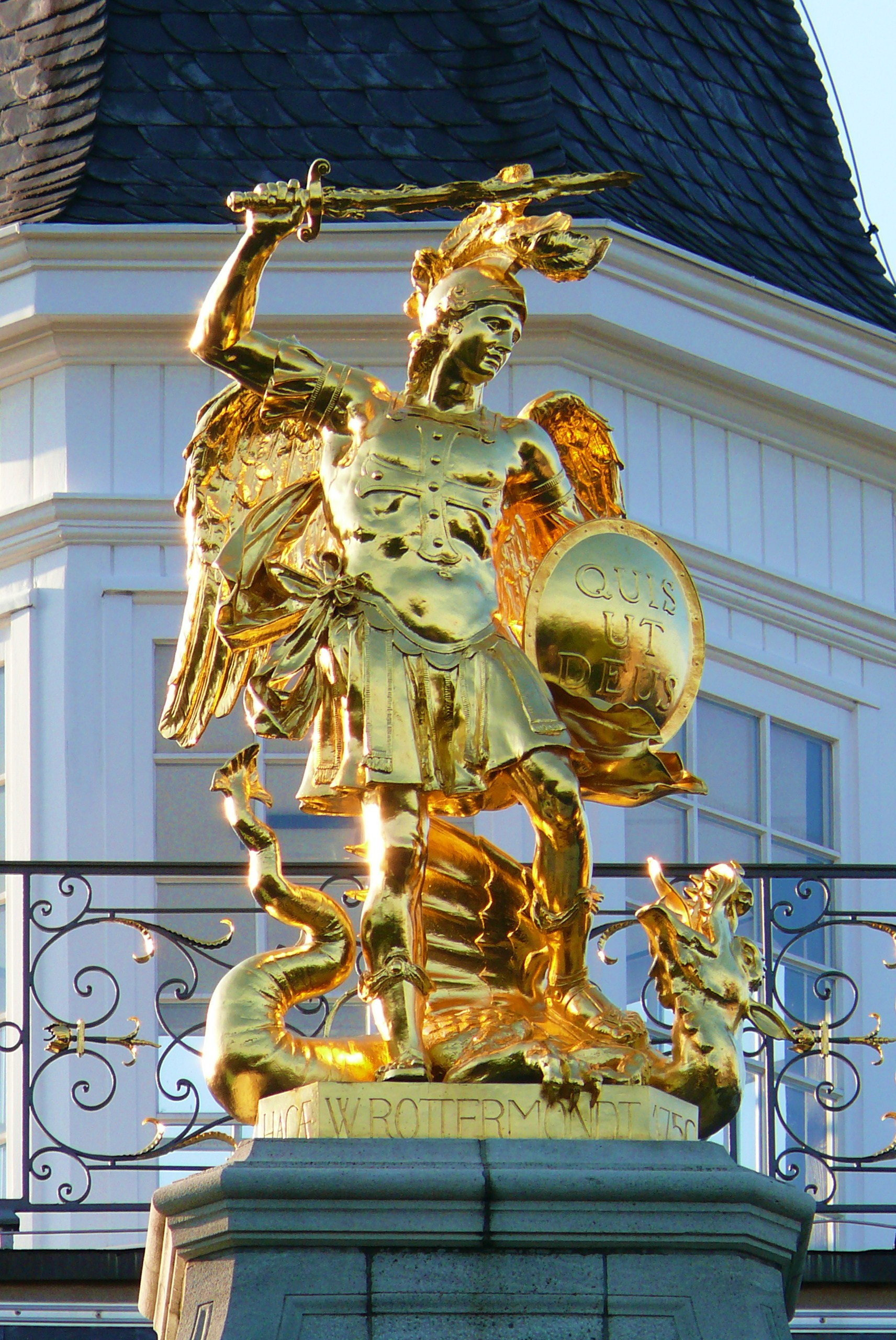 Erzengel Michael auf dem Koblenzer Tor in Bonn